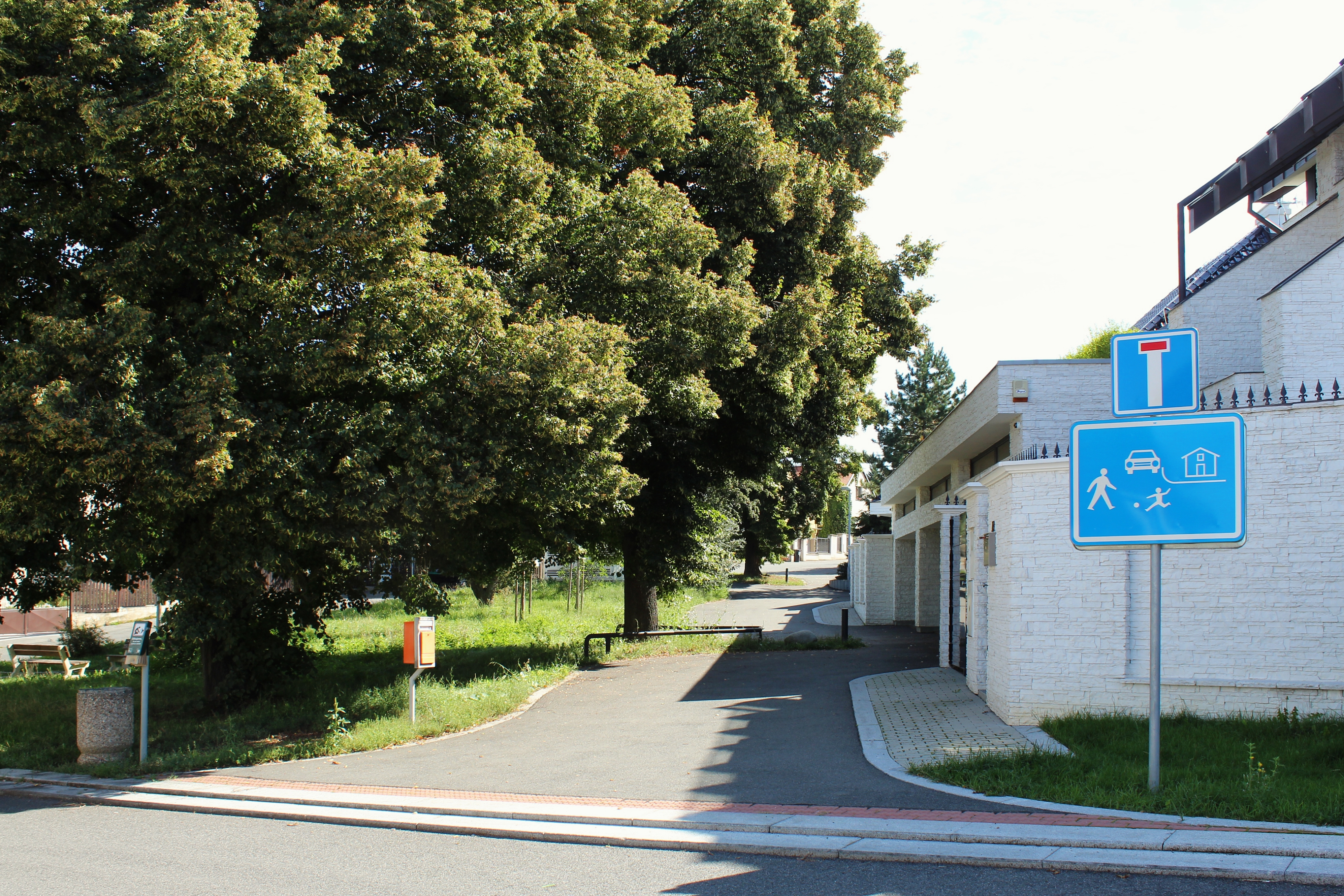 Praha, Ruzyně